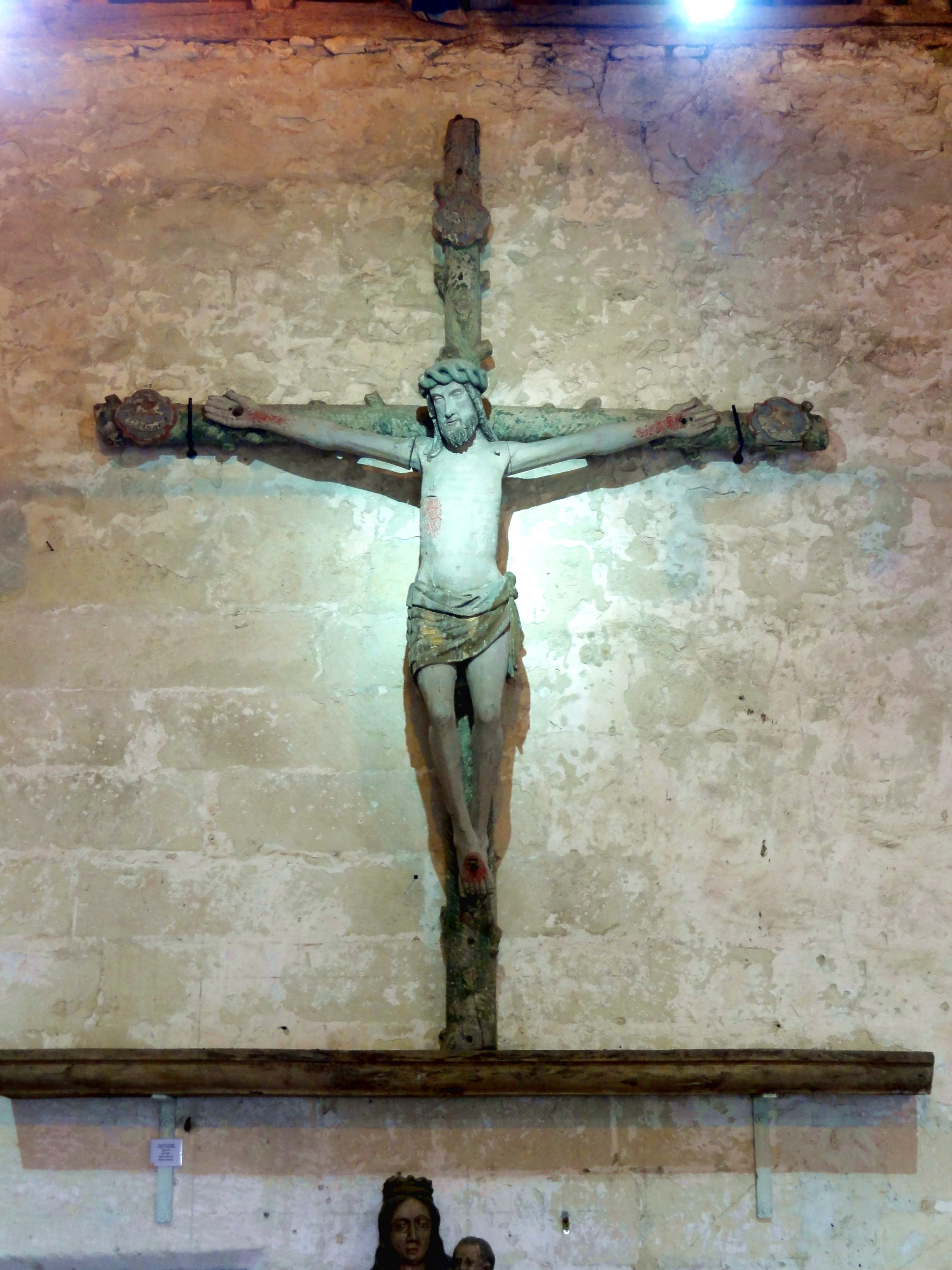 Poutre de gloire, XVIe s. (Vierge et saint Jean en restauration).